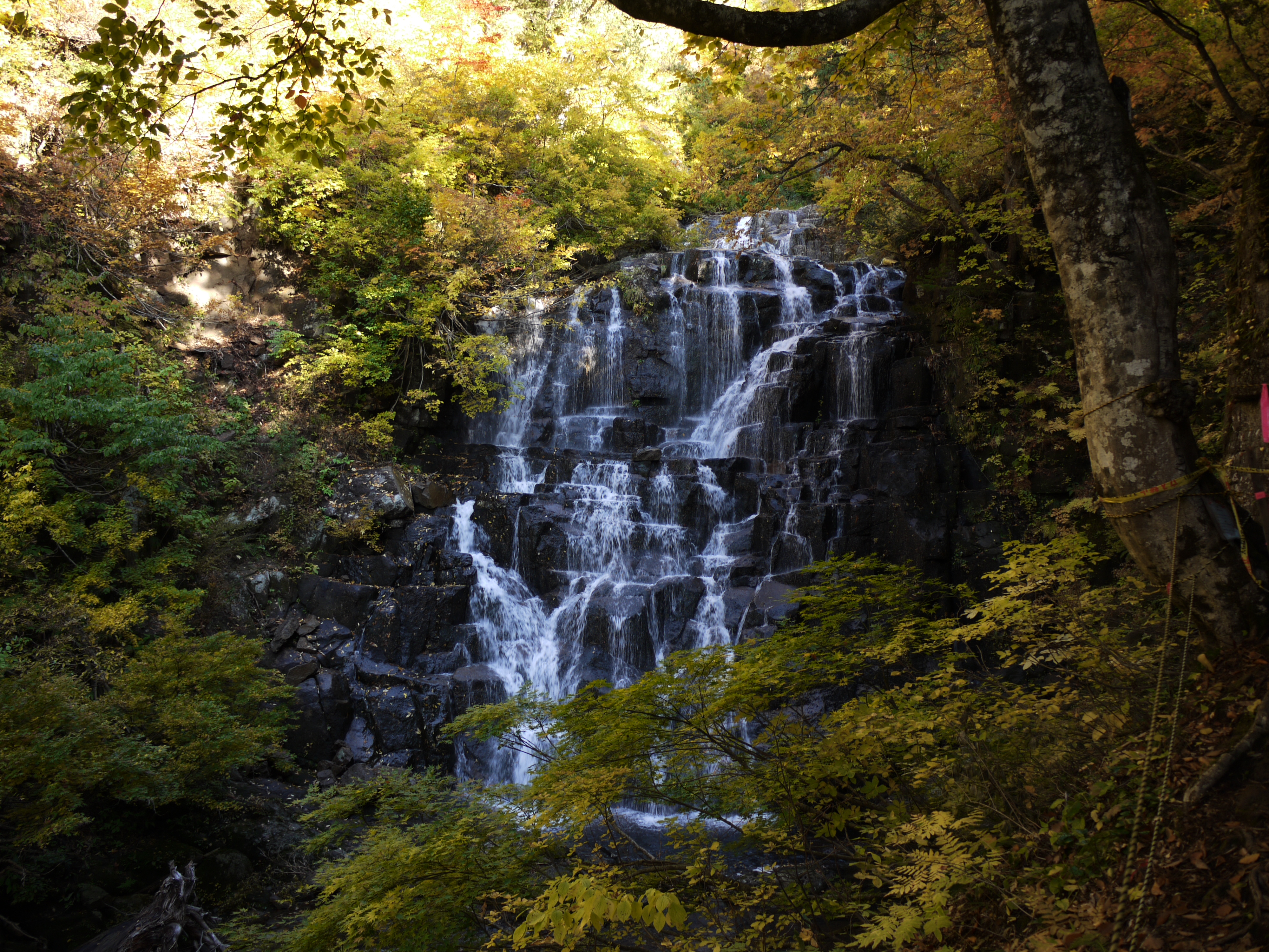 ニノ滝 立又渓谷（秋田県）